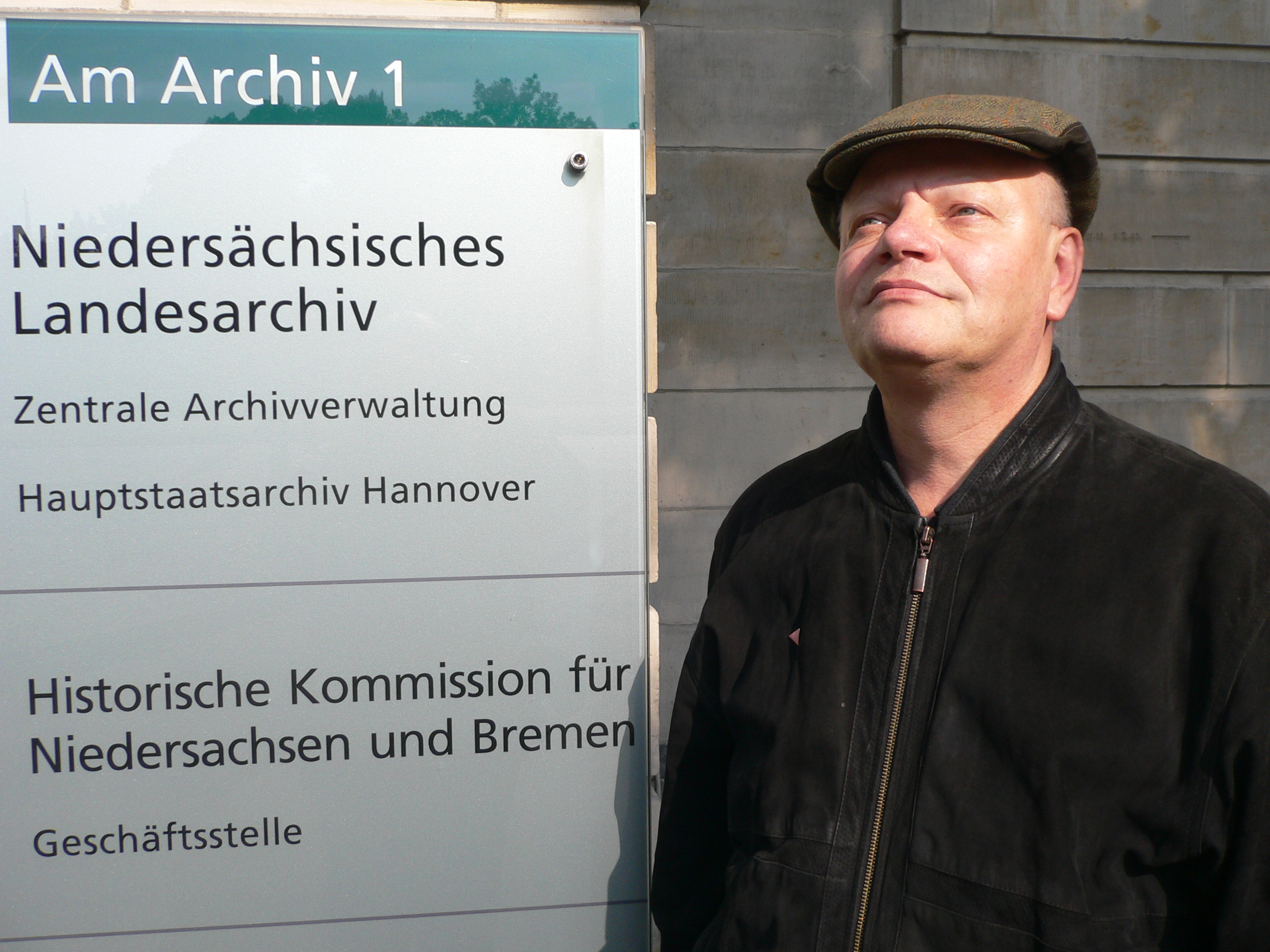 Rainer Hoffschildt vor dem Niedersächsischen Landesarchiv, Hauptstaatsarchiv Hannover.